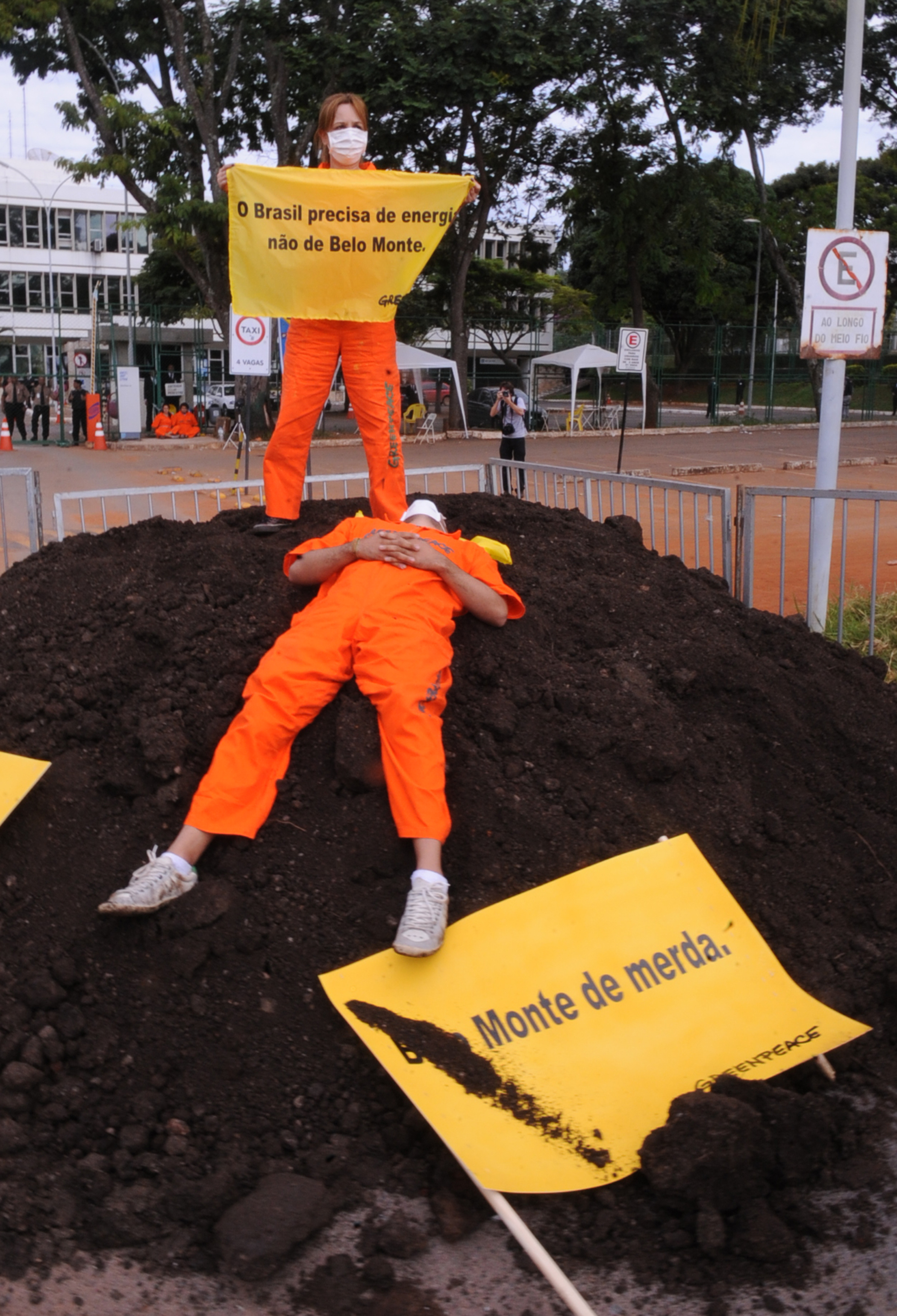 Greenpeace faz manifestação com caminhão contendo esterco de vaca em protesto ao leilão que define o consórcio vencedor para a construção da Usina Hidrelétrica de Belo Monte.